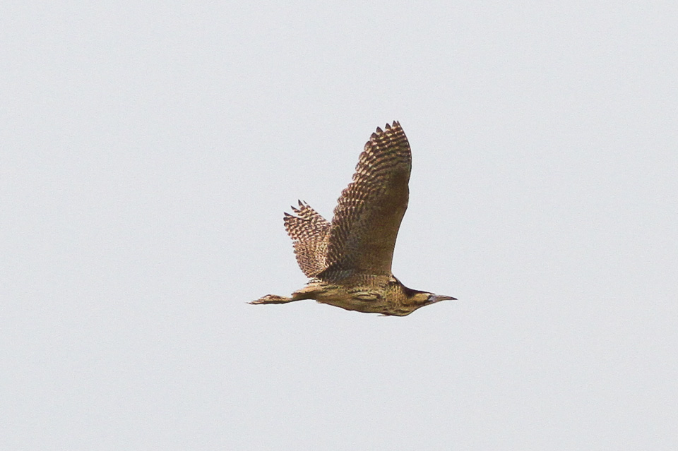 Astana